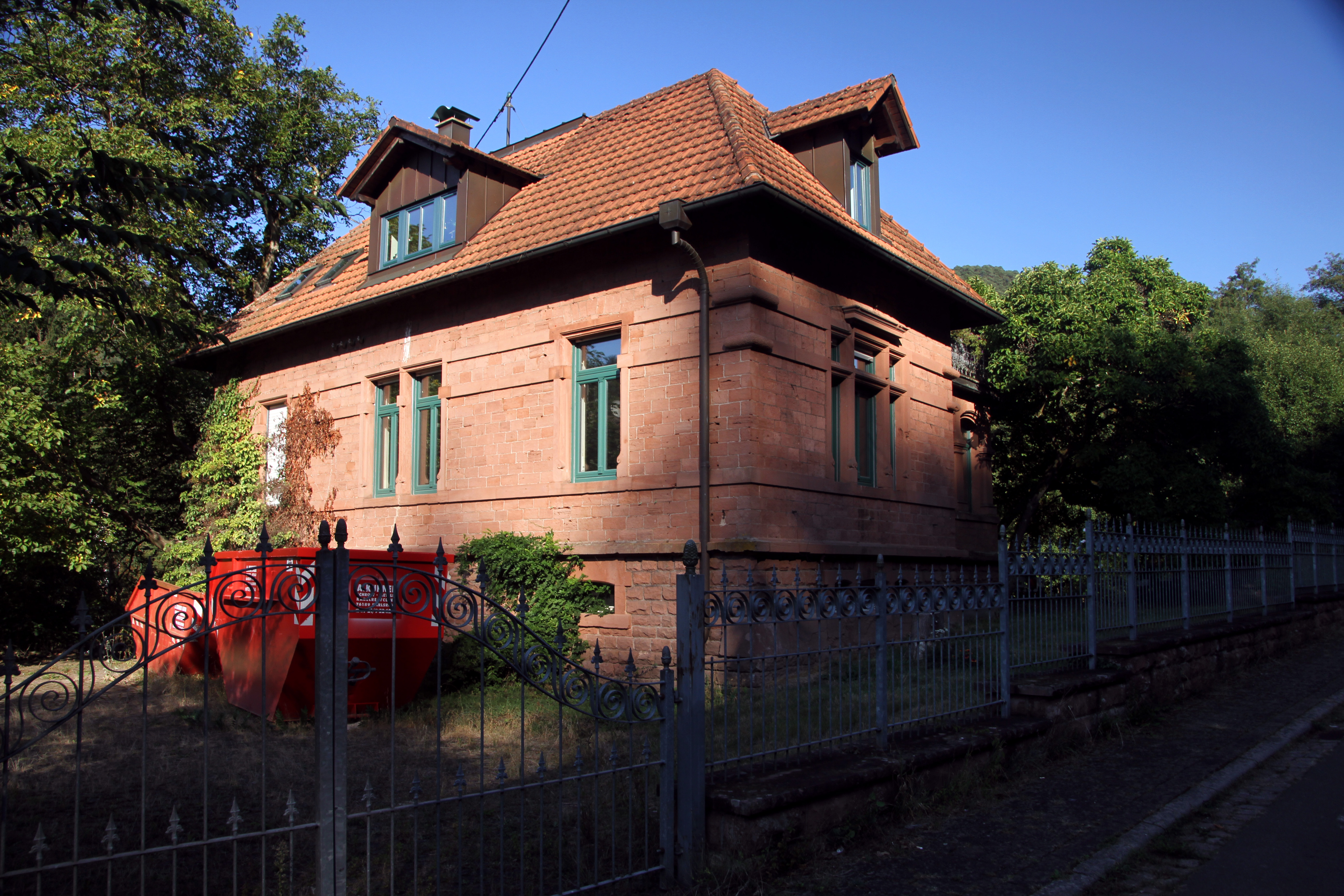 Villa Steiner